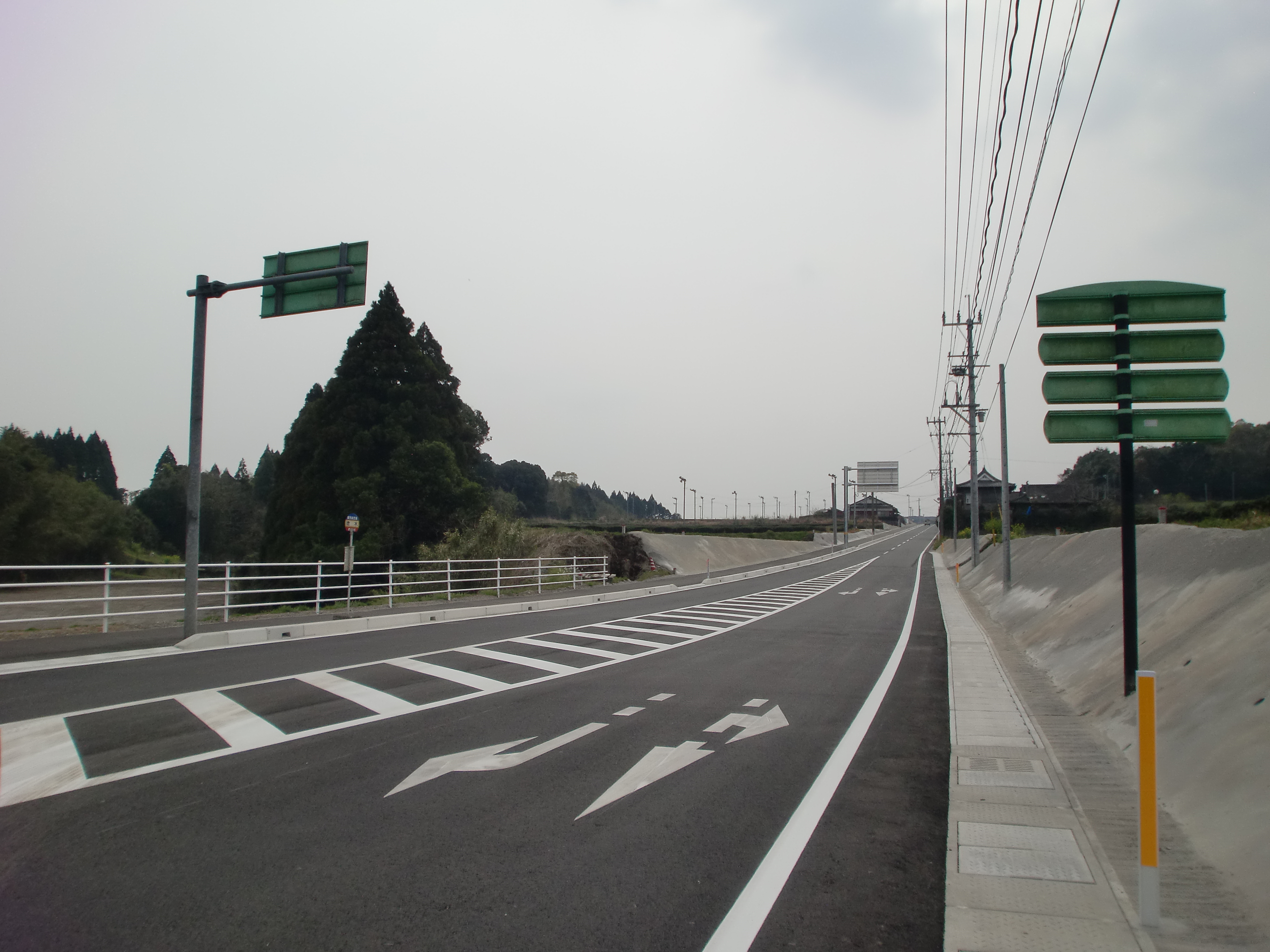 鹿児島県道34号枕崎知覧線を塗木交差点から枕崎方面に望む